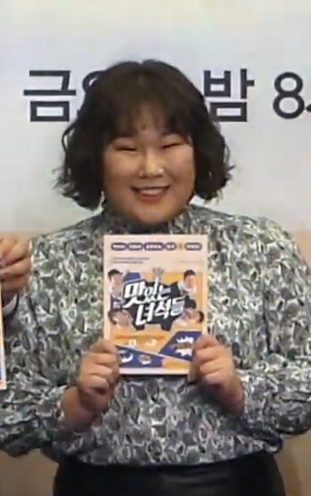 맛있는녀석들 5주년 간담회에서 기념 사진을 촬영하고 있다.